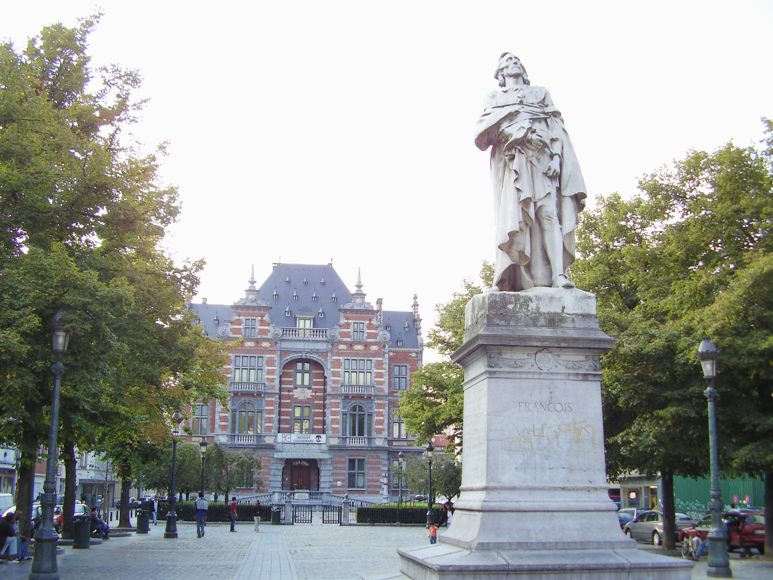 Description